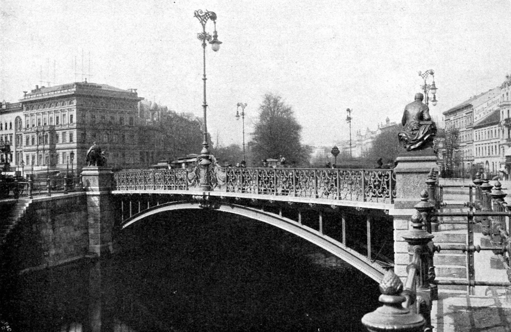 Potsdamer Brücke in Berlin um 1905